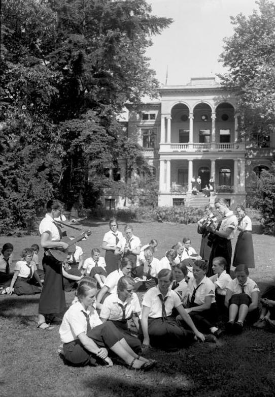 Die Reichsführerinnenschule des Bundes Deutscher Mädchen in Potsdam ! Die neue Schulungsstätte des B.D.M. befindet sich in einem herrlichen Parkgelände in Potsdam. Reichsjugendführer Baldur von Schirach, hat dieses Heim selbst geweiht und in bedeutsamen Worten auf die große Verantwortung hingewiesen, die jede Jugendführerin an der Aufbeuarbeit des Dritten Reiches übernimmt. Hier werden in einem Schulungskursus die Mädchen zu Führerinnen der deutschen weiblichen Jugend herangebildet. Nach getaner Arbeit beim Volksliedersingen im Park der Führerinnenschule Potsdam. Maren Richter, Winfried Sträter: Potsdam: Der historische Reiseführer, S. 49 (online)